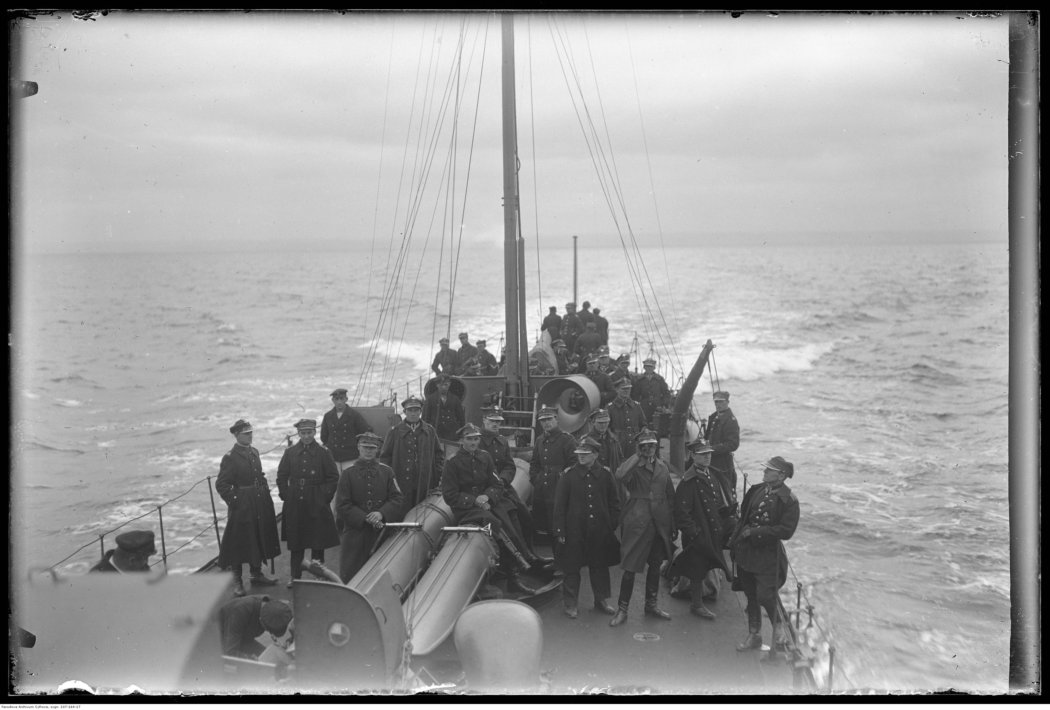 Uczestnicy wycieczki na torpedowcu ORP Ślązak.